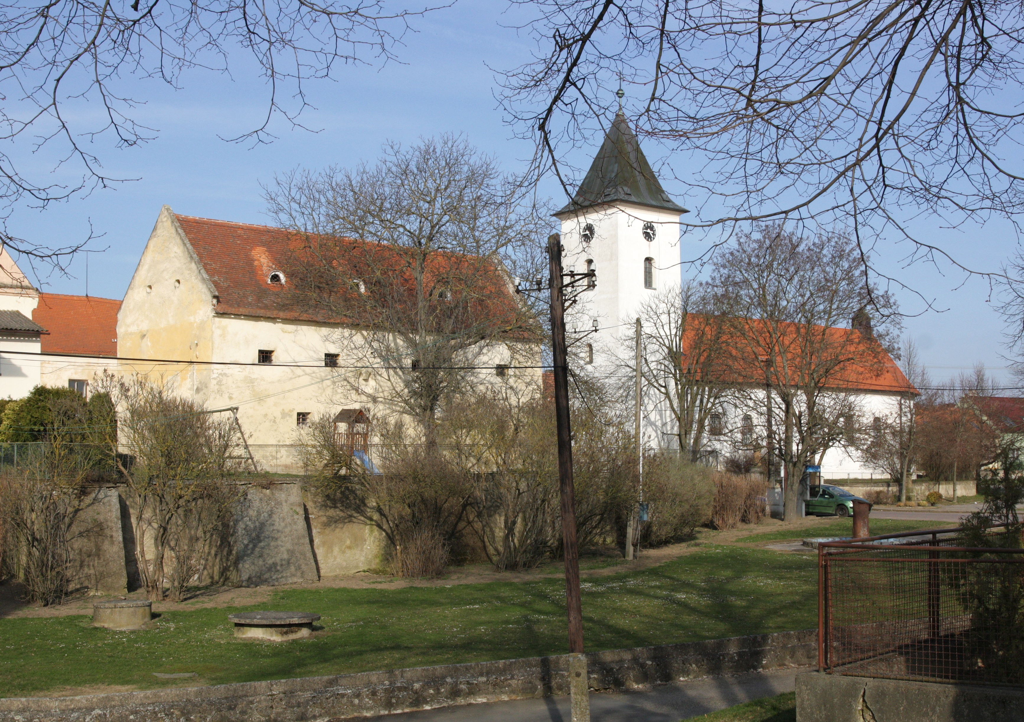 Horní Kounice - kostel a tvrz.